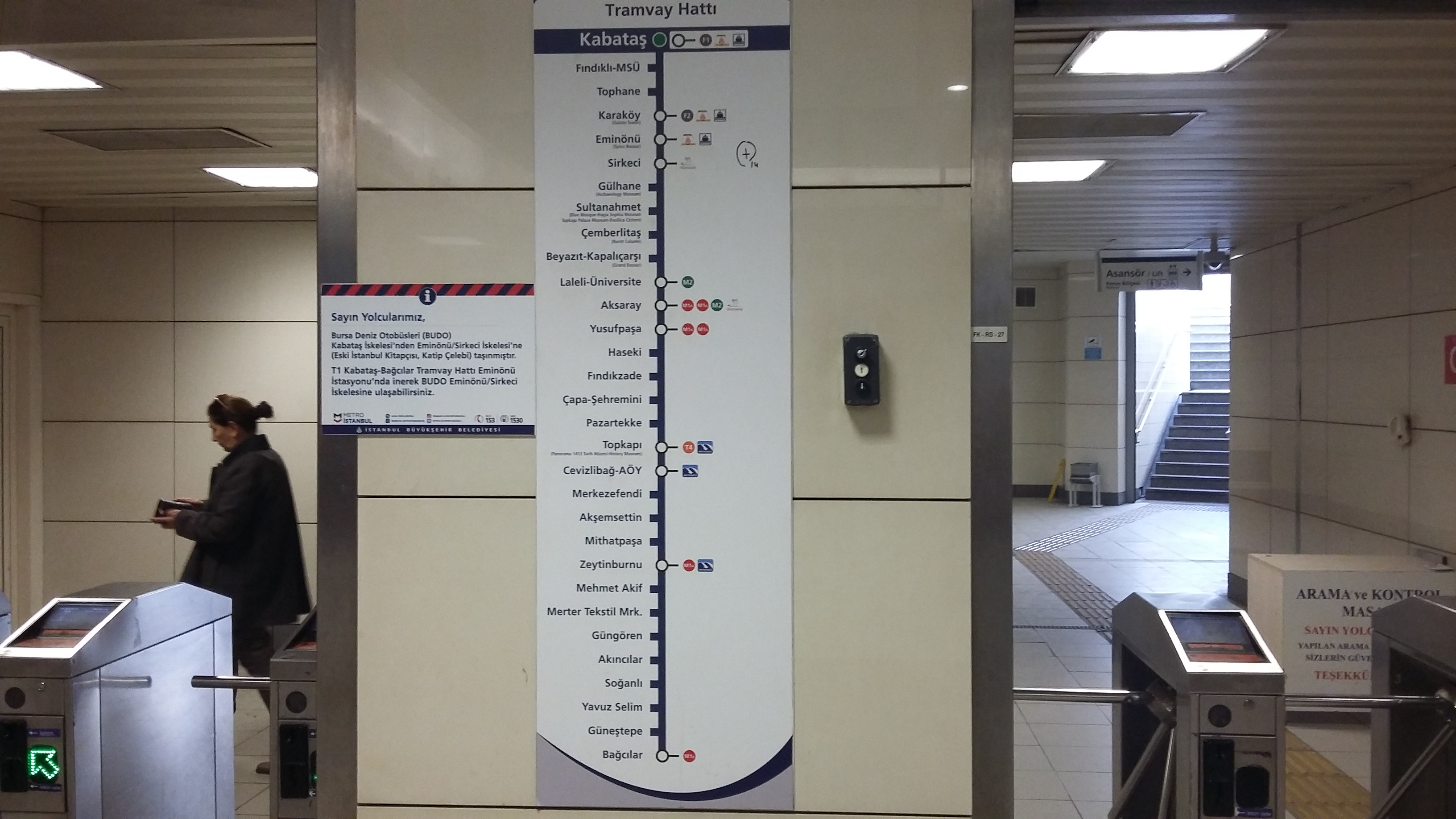 T1 KABATAŞ - BAĞCILAR TRAMVAY HATTI